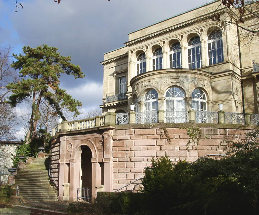 Stuttgart Villa Berg, Ansicht von Westen - selbst fotografiert von Enslin am 23.1.2005.